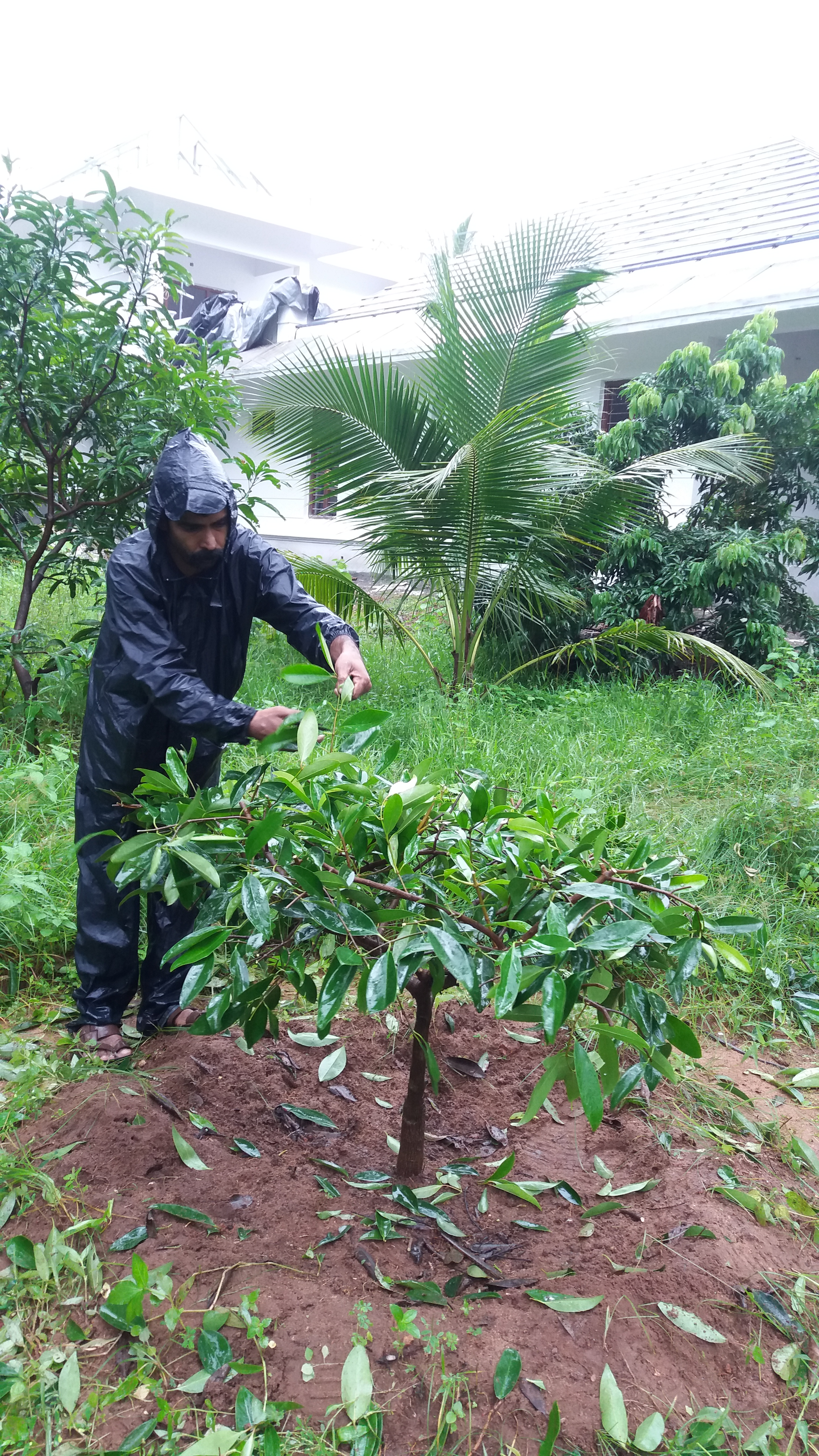 കുടംപുളി മരത്തിന്‍റെ ഇലകോതല്‍ (പ്രൂണിങ്ങ്).Malabar tamarind ശാസ്ത്രീയ നാമം Garcinia gummi-gutta കുടുംബം Clusiaceae.